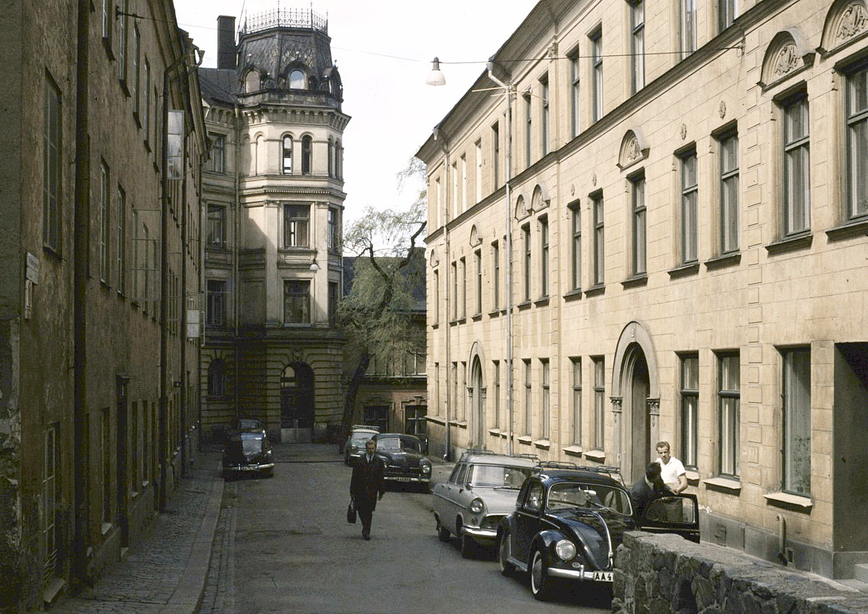 Fredmansgatan sedd mot väster.